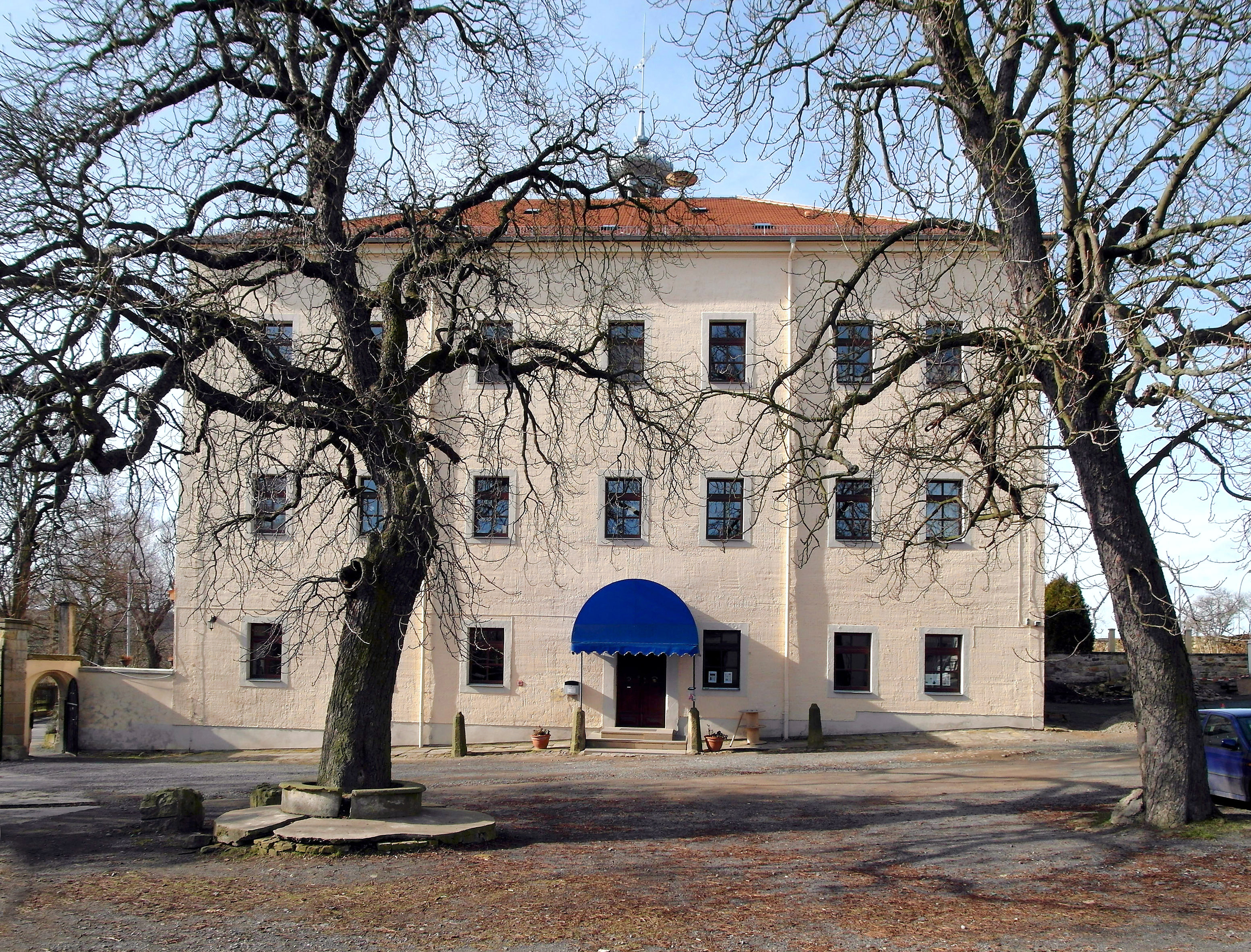 17.02.2014 01809 Röhrsdorf (Dohna) Hauptstraße 3 (GMP: 50.965573,13.807929): Der Herrensitz wird 1436 erstmals erwähnt. Röhrsdorf gehörte im 16. und 17. Jahrhundert den Herren von Bernstein. Das heutige Schloß entstand nach dem Brand von 1890. Sicht aus dem Hof von Osten. SAM1801.JPG]20140217010DR.JPG(c)Blobelt